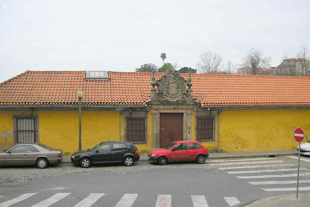 "Albuquerques" house / Casa das Virtudes / Casa dos Pintos de Meireles / Casa dos Albuquerques / Edifício da Cooperativa Árvore in Miragaia, Porto, Portugal.